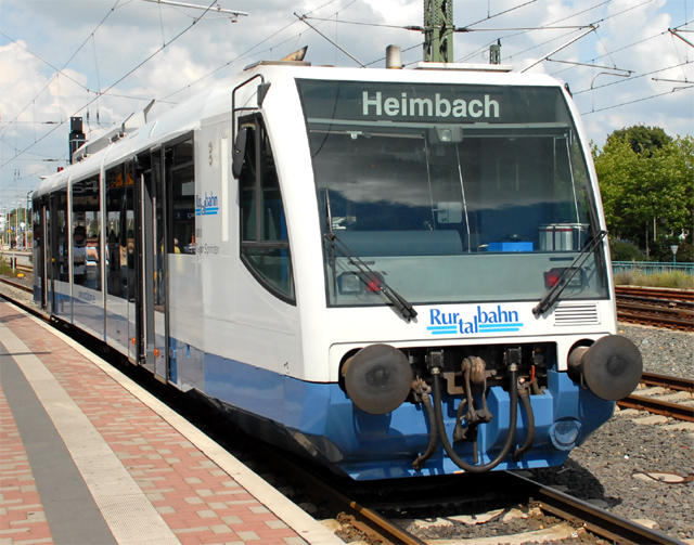 Rurtalbahn treinstel van het type RegioSprinter nr: VT 6.11 te Düren Hauptbahnhof.